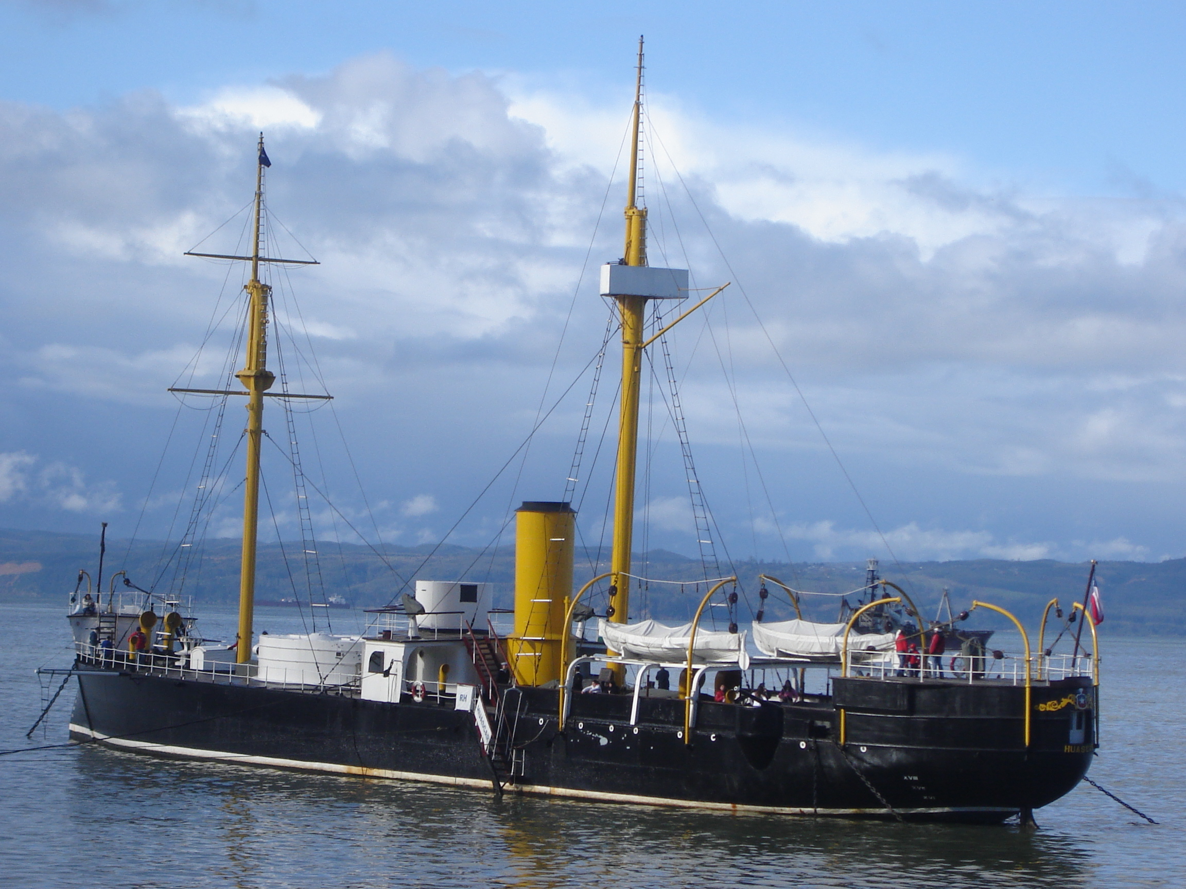 Foto obtenida por el Usuario Valo, el día 27 de julio de 2005 en Talcahuano, Chile. Los demás datos se revelan abajo.